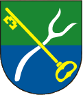 znak obce Želiv, okres Pelhřimov